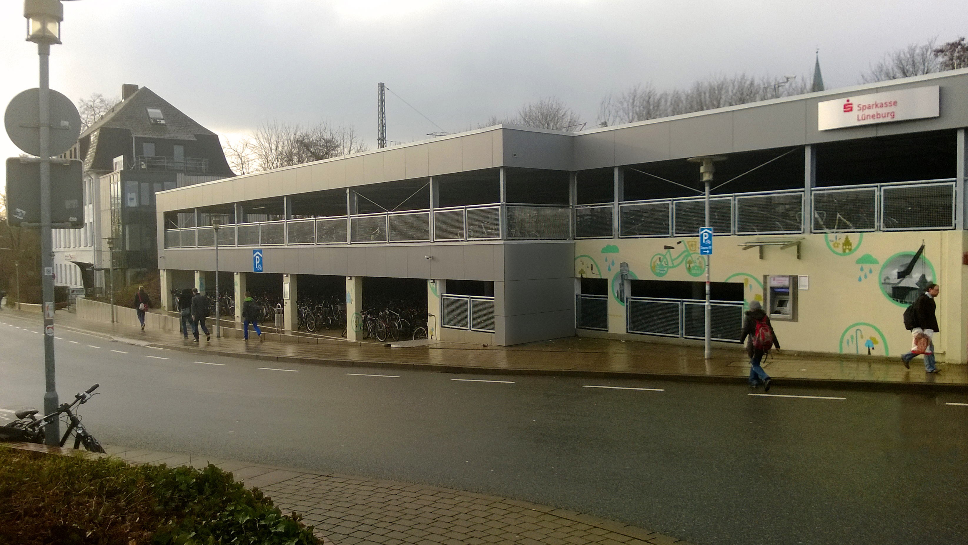 Neues Fahrradparkhaus am Bahnhof Lüneburg.